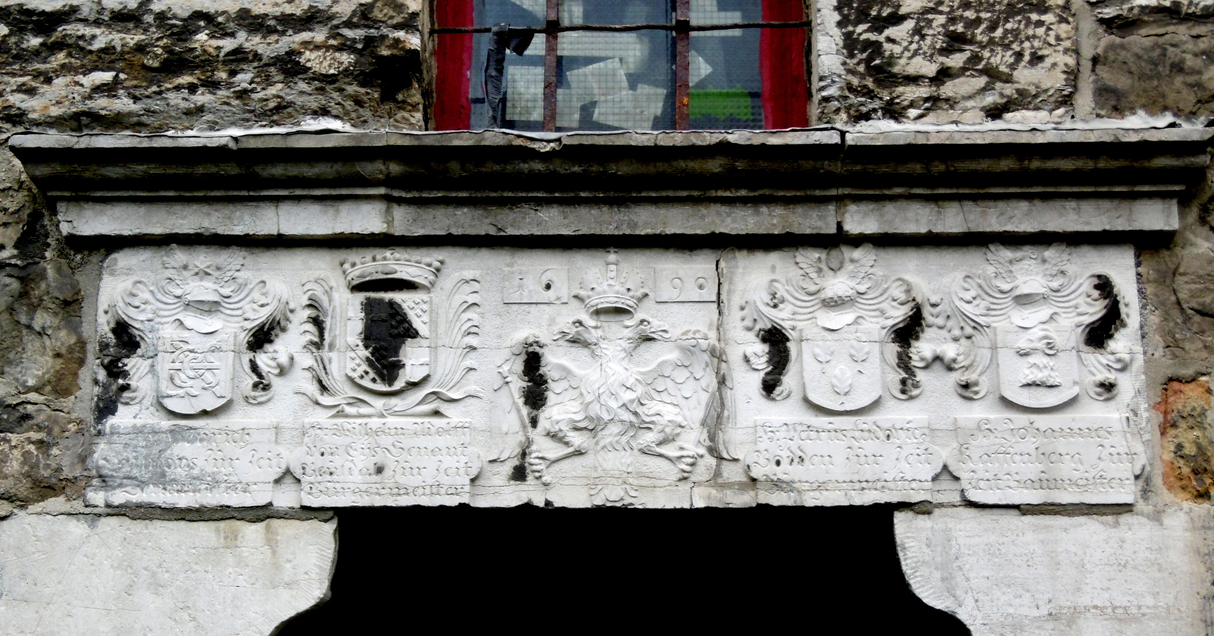 Wappenstein am Türsturz des Langen Turmes in Aachen